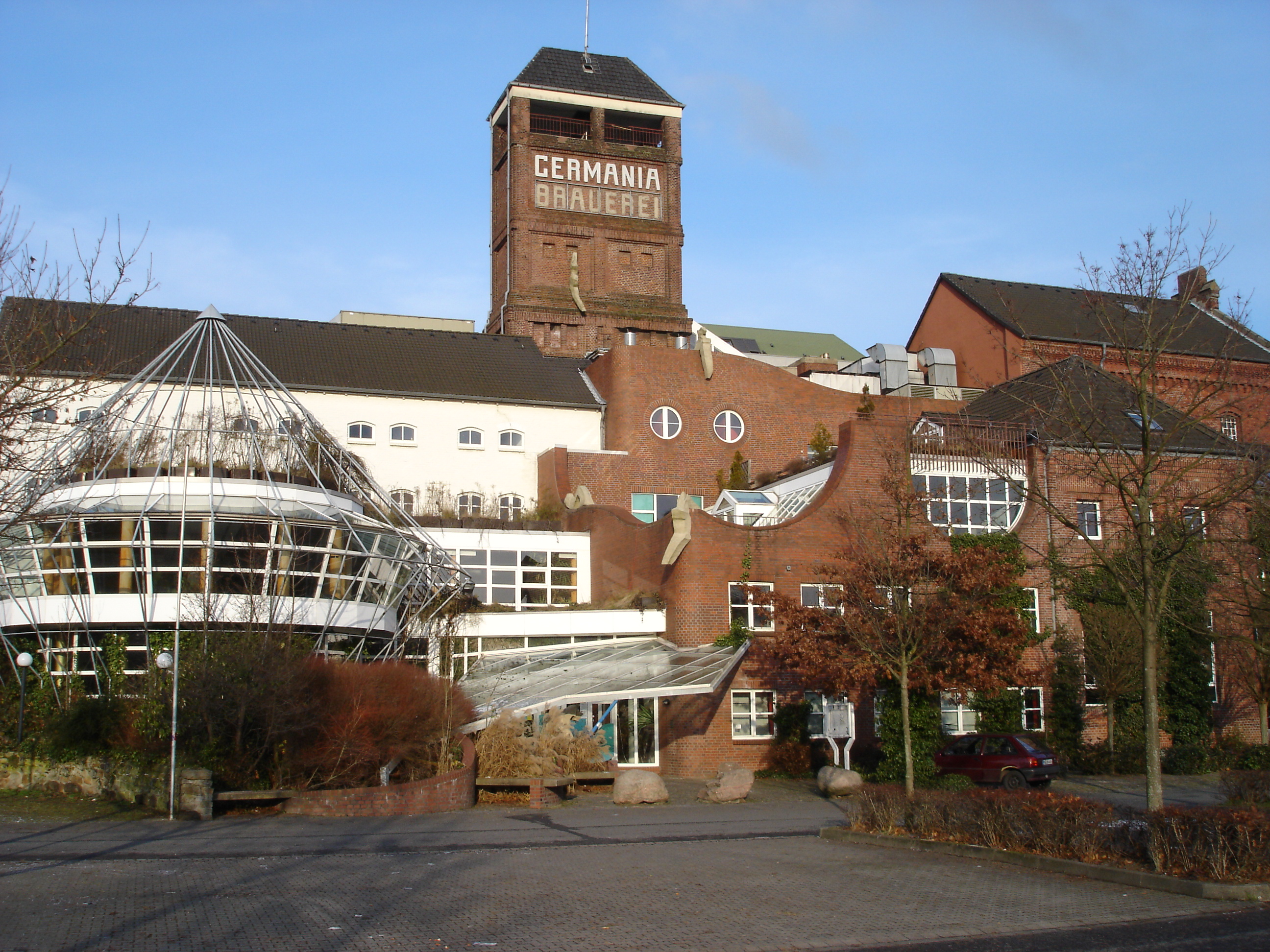 Südansicht der ehemaligen Germania-Brauerei mit dem denkmalgeschützten Turm und Produktionshallen auf der rechten Seite in Münster, Westfalen, Deutschland